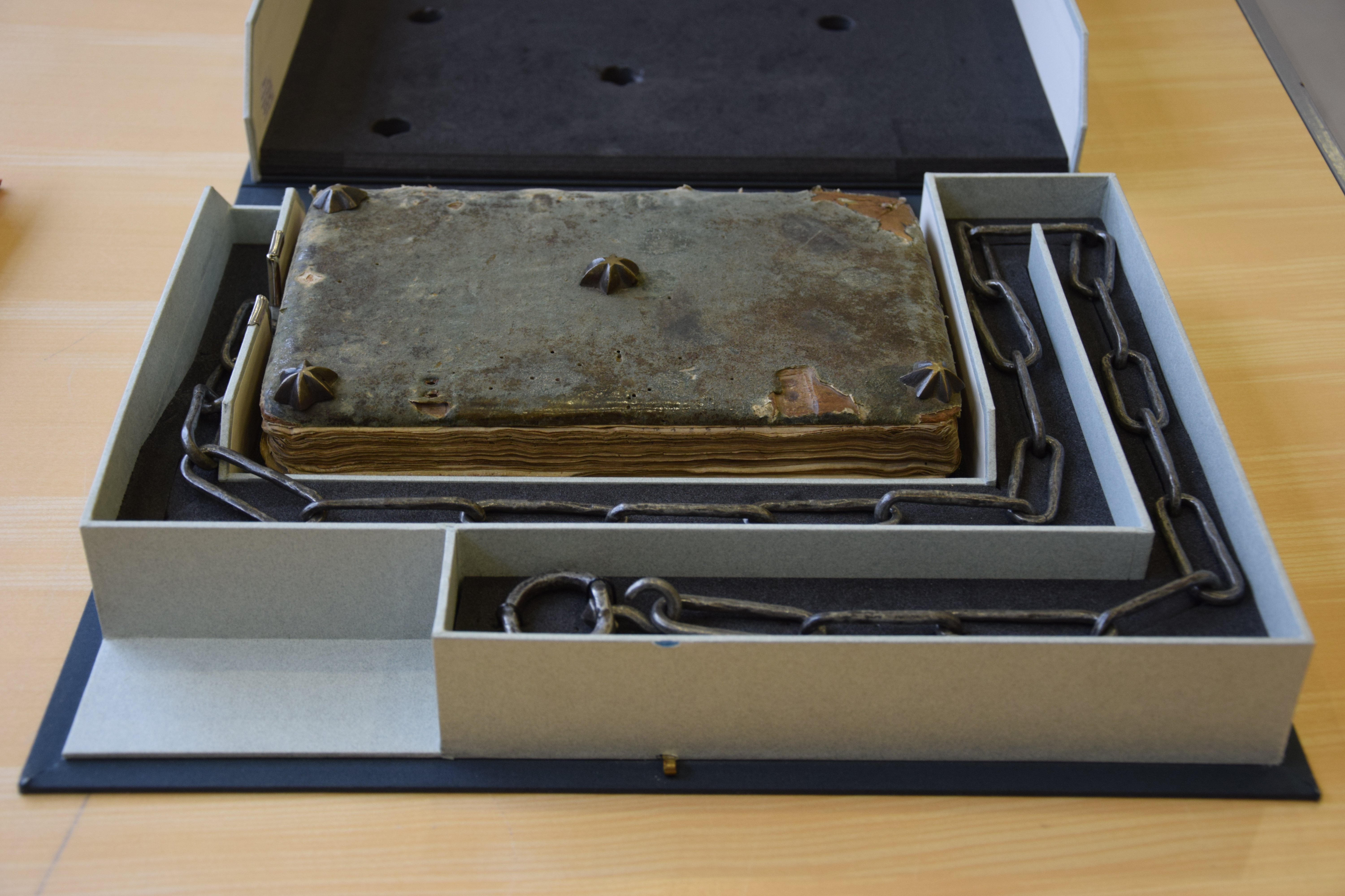 Archives départementales de l'Oise cartulaire enchaîné de senlis 1025-1257 adt 1 AA9